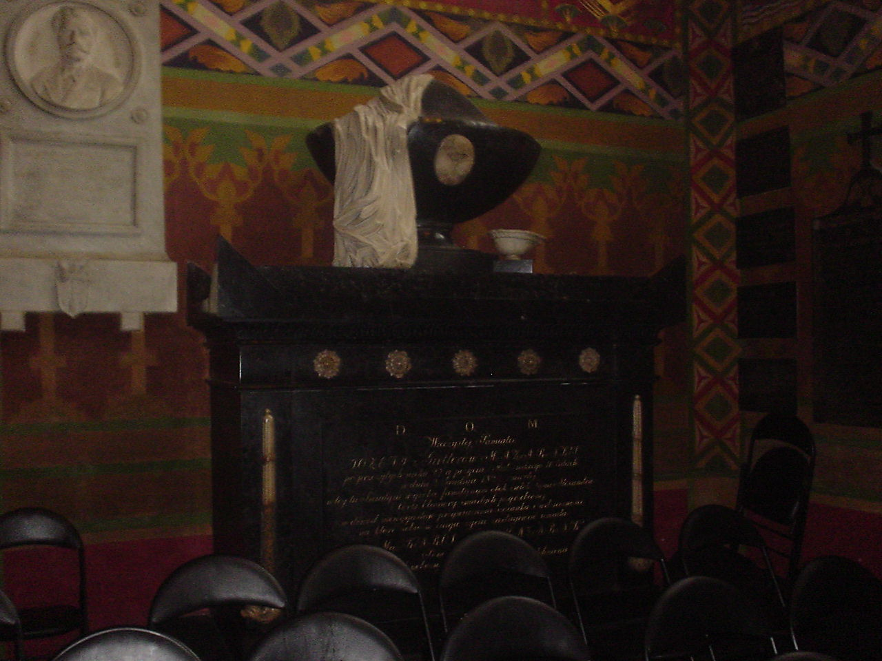 Nagrobek w kaplicy św. Wawrzyńca przy kościele Mariackim w Krakowie